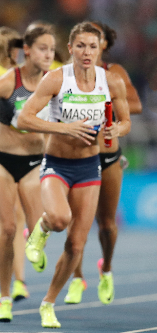 Rio de Janeiro - Eliminatórias do revezamento 4 x 400m nos Jogos Rio 2016, no Estádio Olímpico (Fernando Frazão/Agência Brasil)